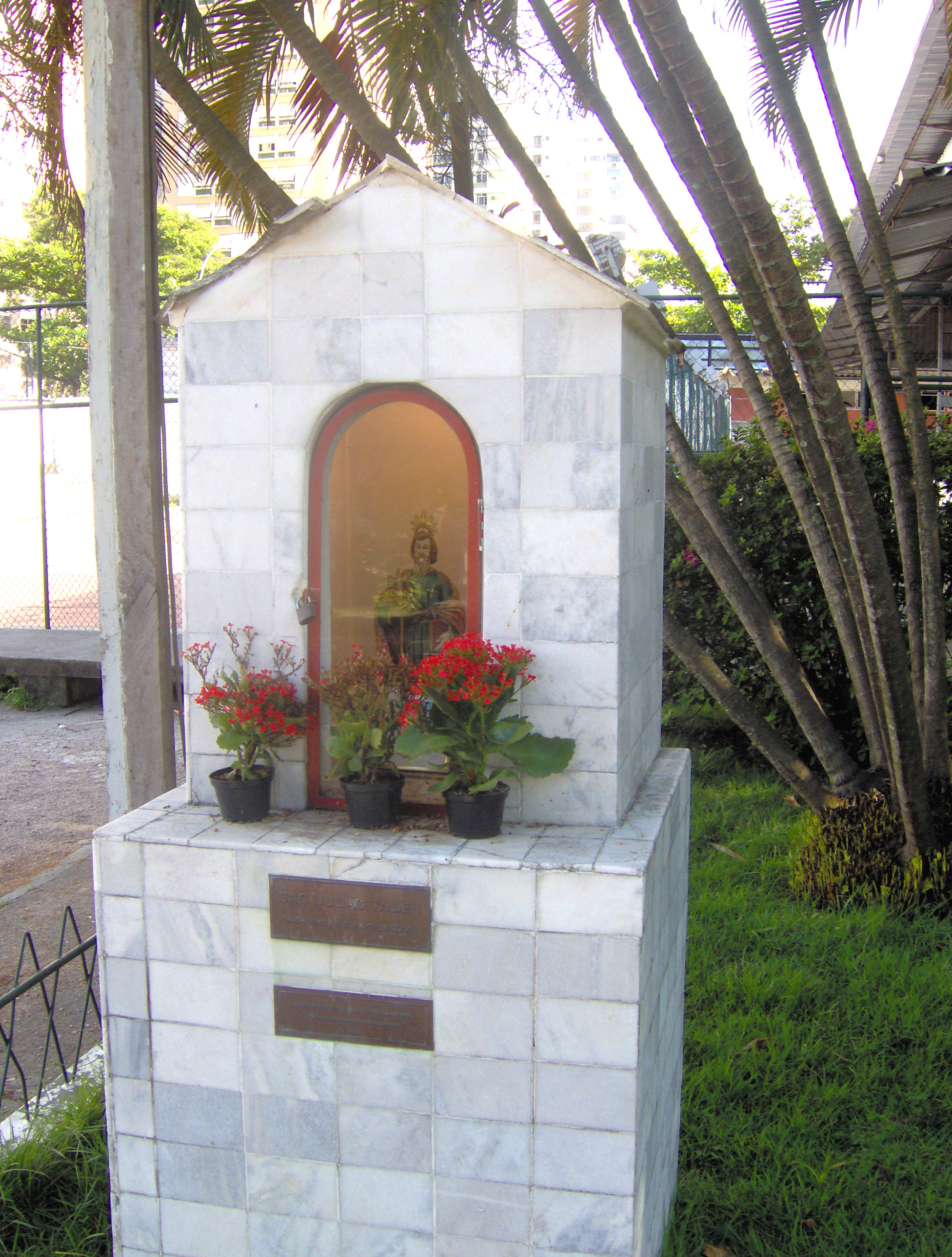 Santuário de São Judas Tadeu, padroeiro do Clube de Regatas do Flamengo, na sede do clube na Gávea, Rio de Janeiro.